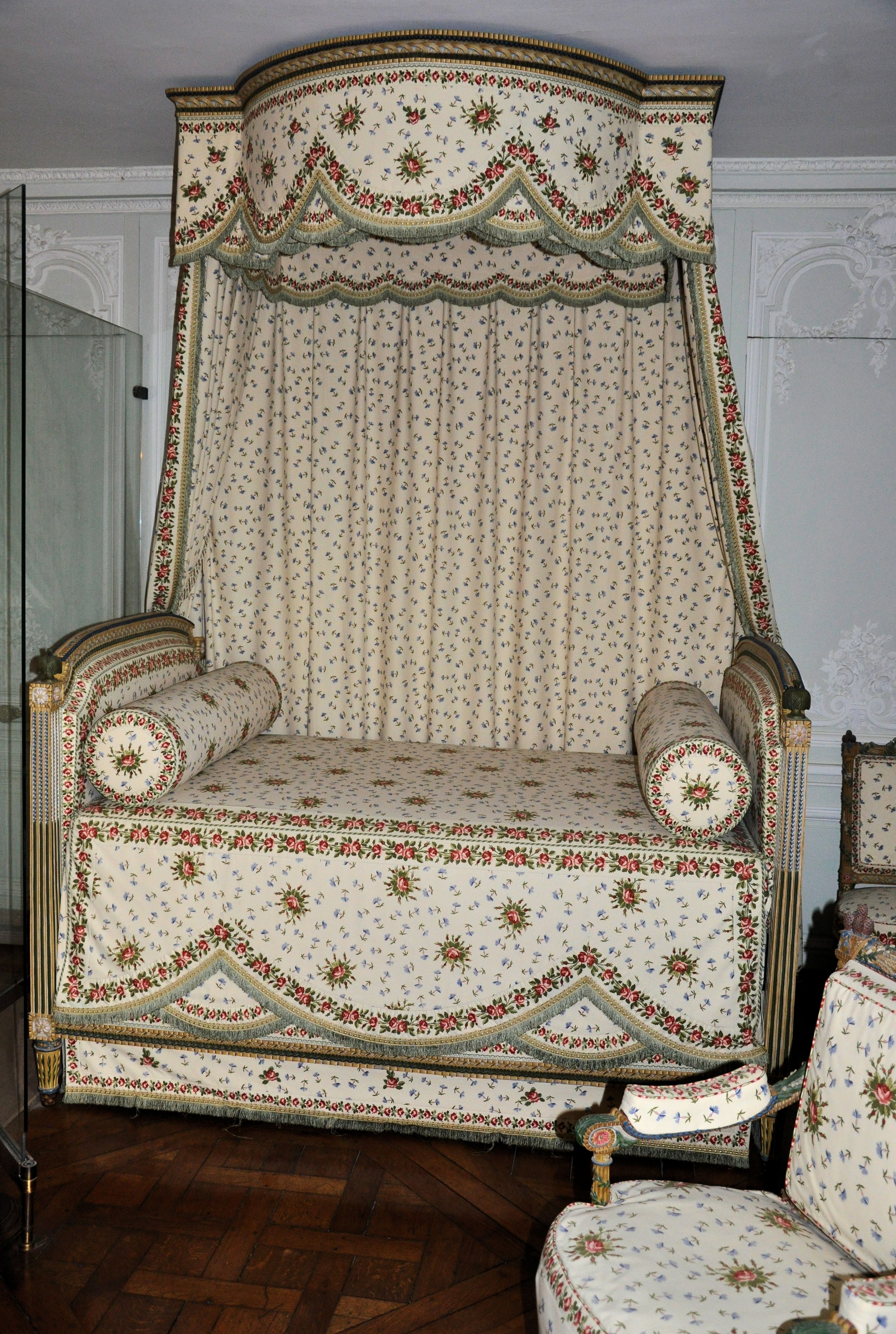 Petit Trianon - Chambre de la Reine (mobilier aux épis)